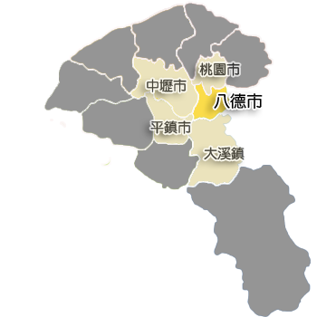 桃園縣八德市行政區劃。